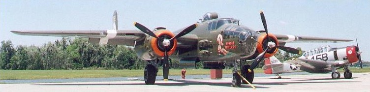 B-25 “Mitchell” Bomber & AT-6